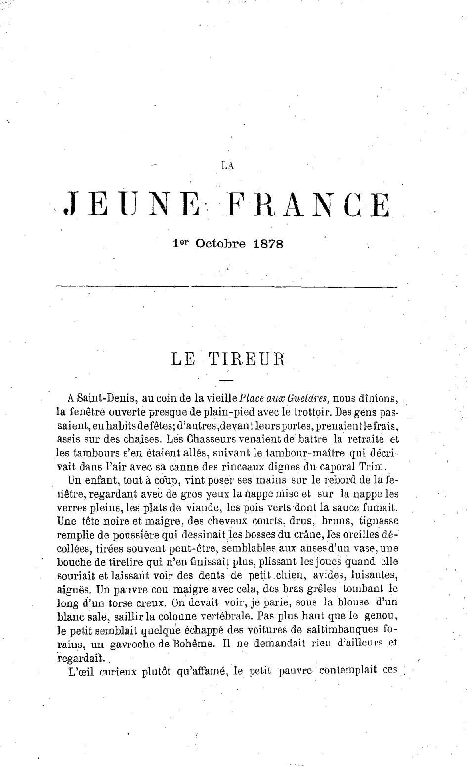 Titre : La Jeune France (Paris. 1878) Titre : La Jeune France Éditeur : [s. n.] (Paris) Date d'édition : 1878-1888 Type : texte,publication en série imprimée Langue : Français Format : application/pdf Identifiant : ark:/12148/cb34482935w/date Identifiant : ISSN 12456853 Source : Bibliothèque nationale de France, département Littérature et art, 8-Z-1248 Relation : Description : Variante(s) de titre : La Jeune France : revue libre Provenance : bnf.fr Date de mise en ligne : 22/06/2010 (Effacé le timbre du BNF en haut, et la mention de la source en bas. Quelques points noirs aussi enlevés).